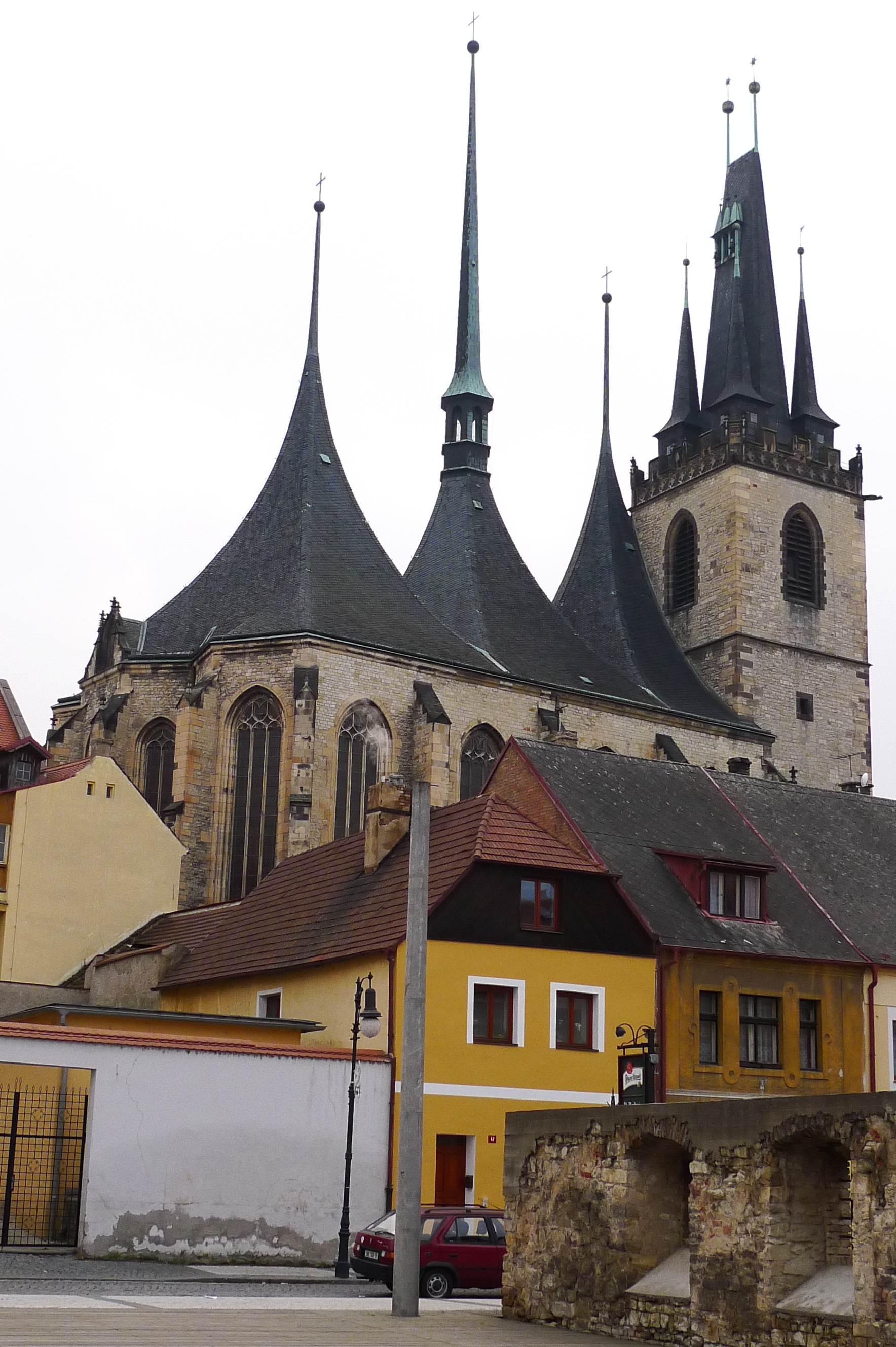 Kostel sv. Mikuláše (Louny), Louny